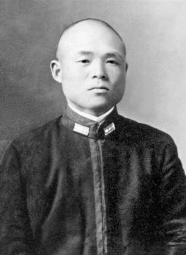 Japanese admiral Minoru Ōta